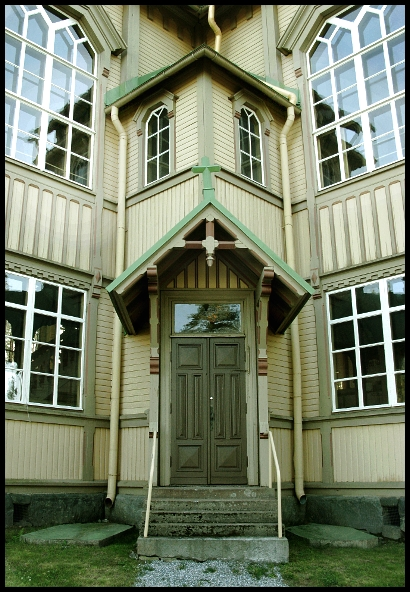 Yksityiskohta Heinäveden kirkosta.